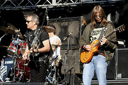 Viticus tocando en Wilde, 2009